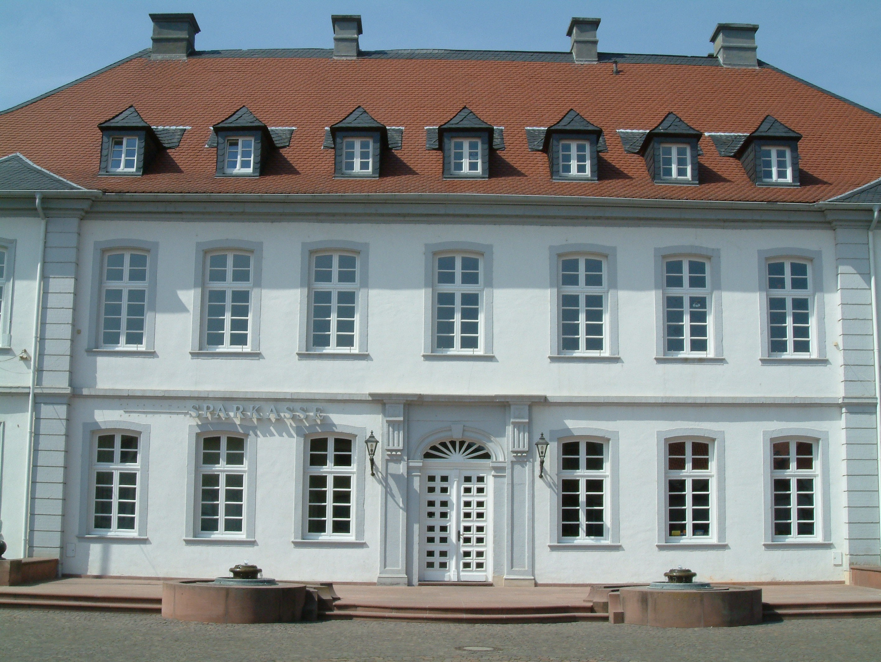 Sturmfedersches Schloss (Ostfassade) zu Dirmstein